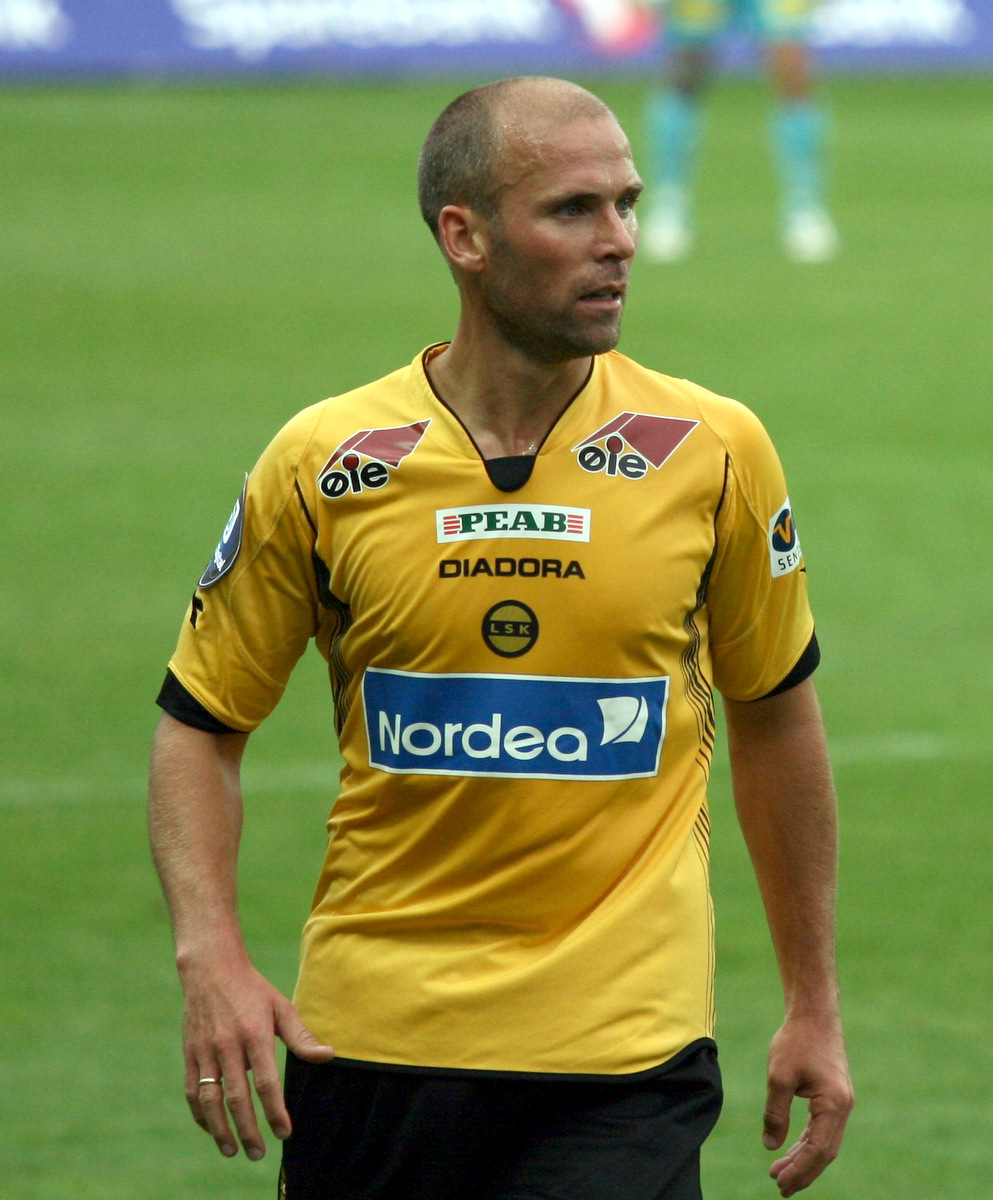 Steinar Pedersen